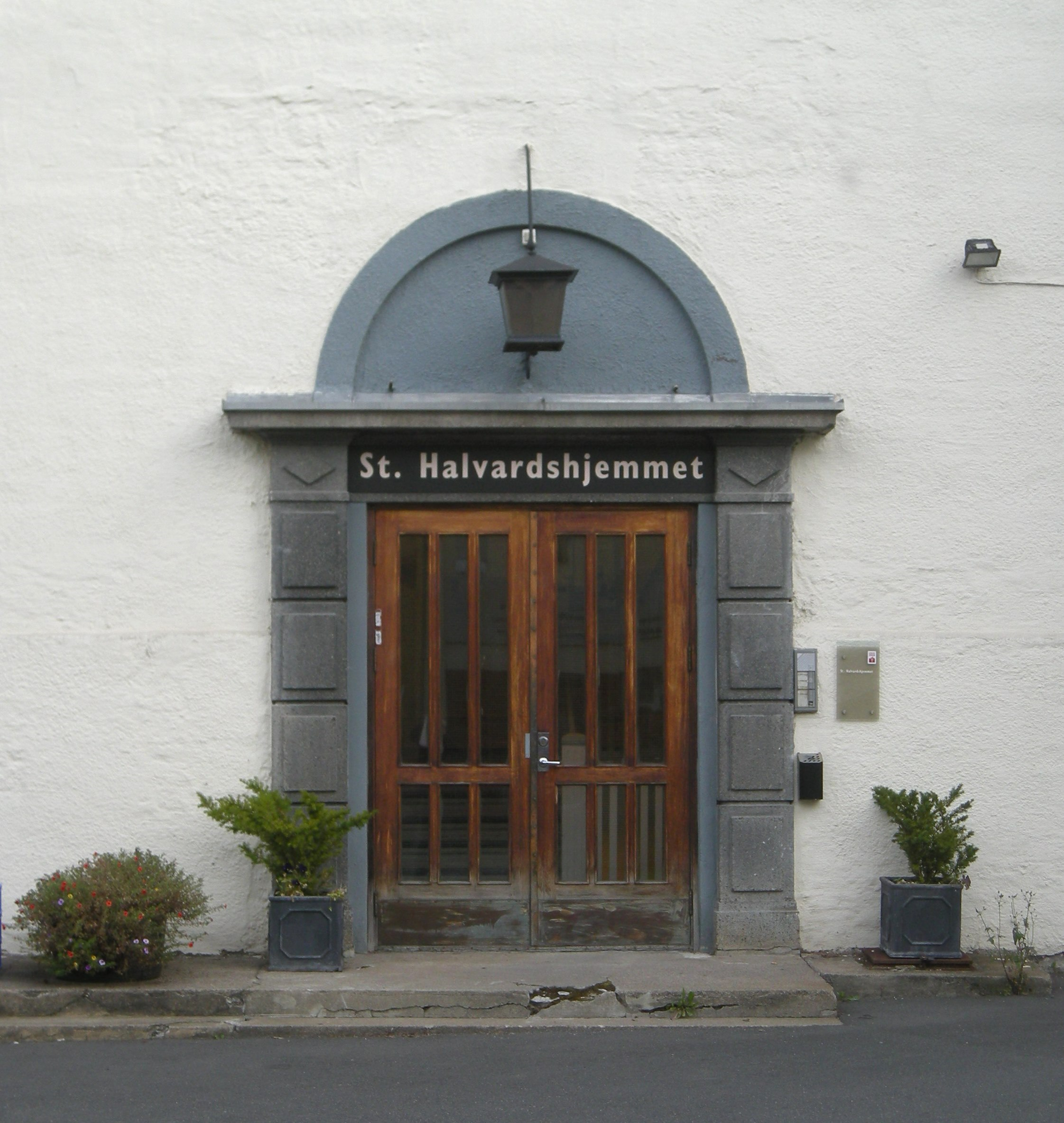 St. Hallvardshjemmet i St. Hallvards gate 28 i Oslo drives av Kirkens bymisjon.